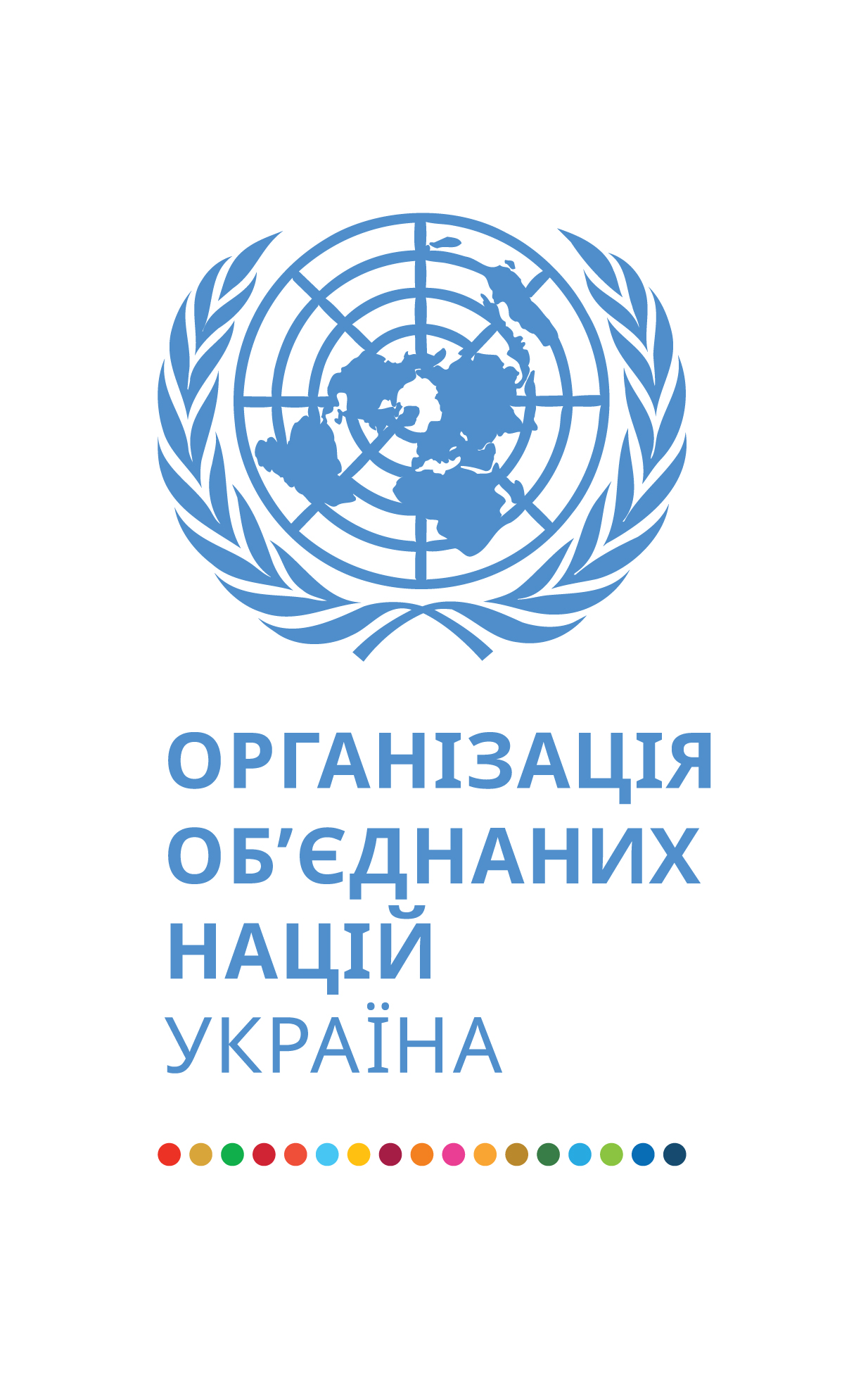 Офіційний логотип Представництва ООН в Україні та Програми ООН із відновлення та розбудови миру альбомної (книжкової) орієнтації.